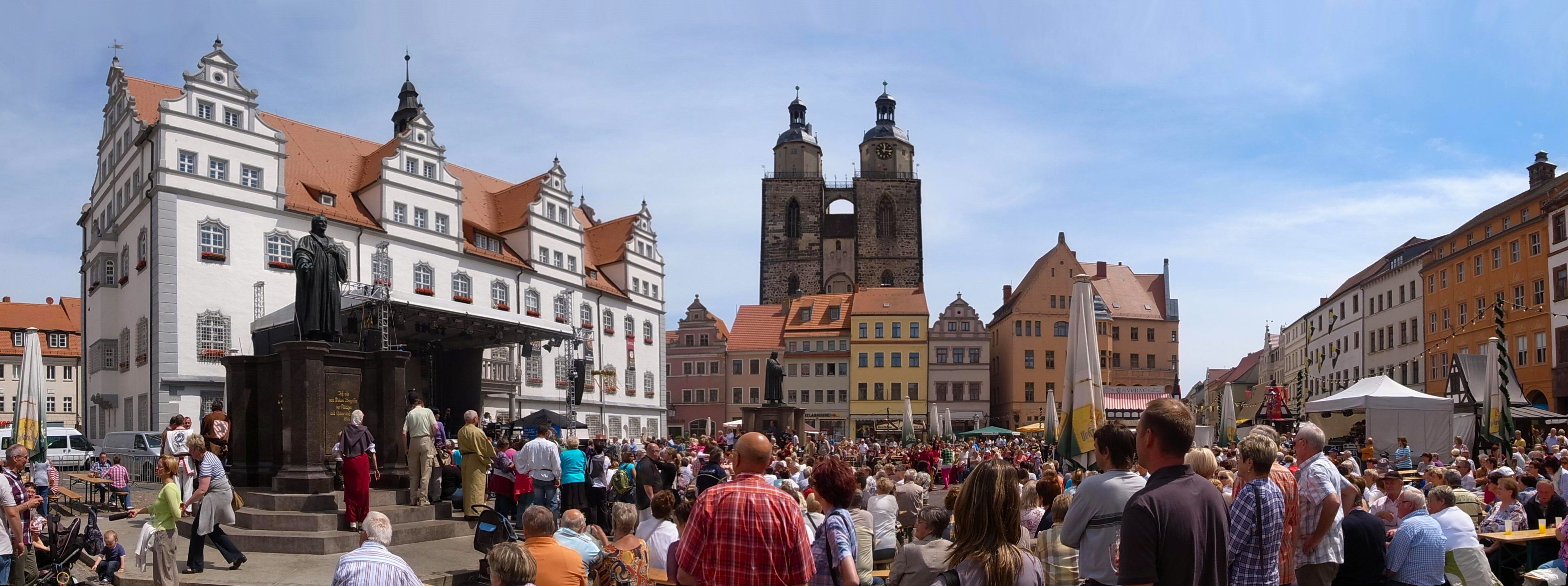 Wittenberg, Stadtfest Luthers Hochzeit. Marktplatz mit Rathaus, Denkmale von Melanchthon und Luther, Stadt- und Pfarrkirche St. Marien )